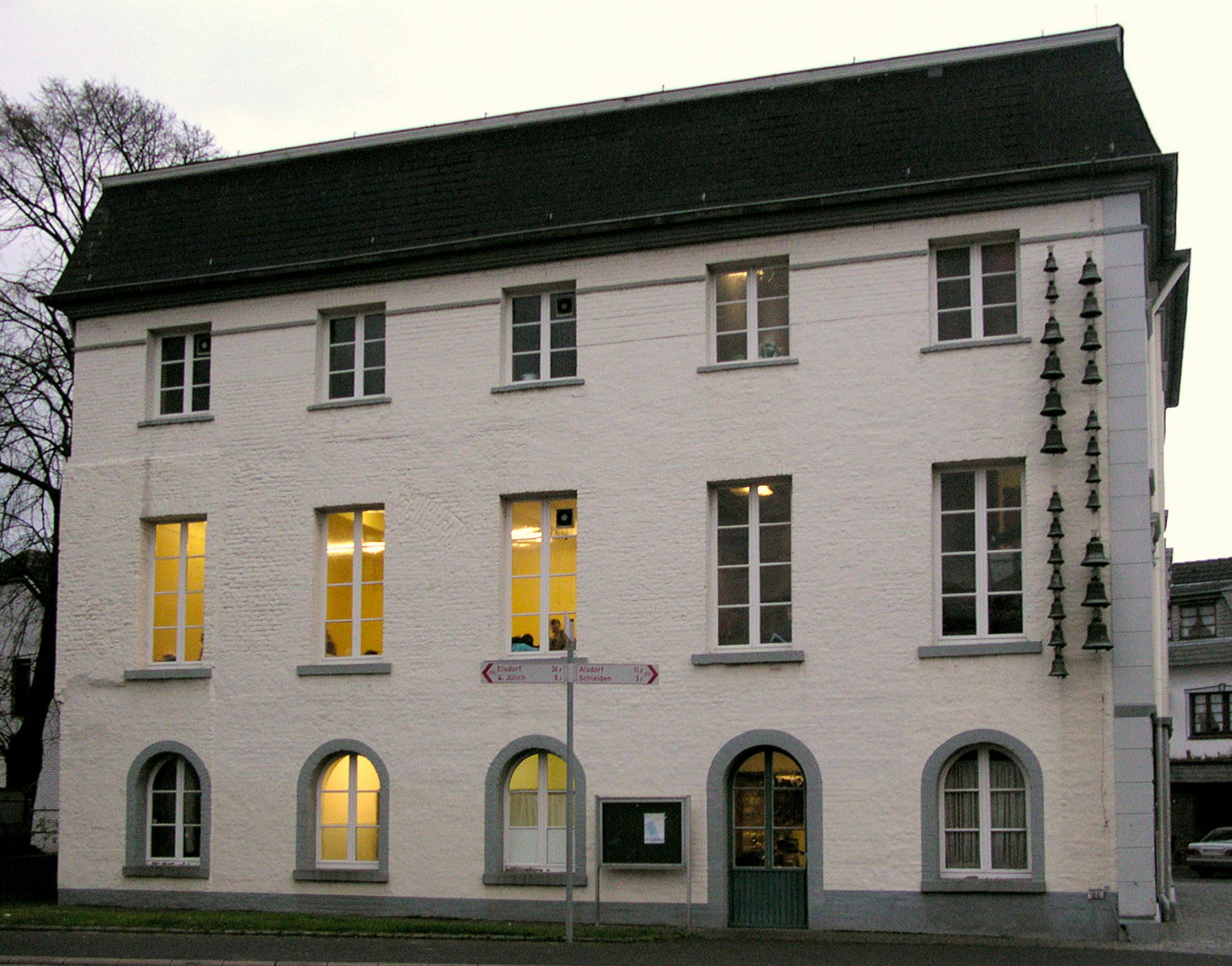 Aldenhoven, Gedenktafel am Ludwig-Gall-Haus für den gleichnamigen “Retter des Moselweinbaus”